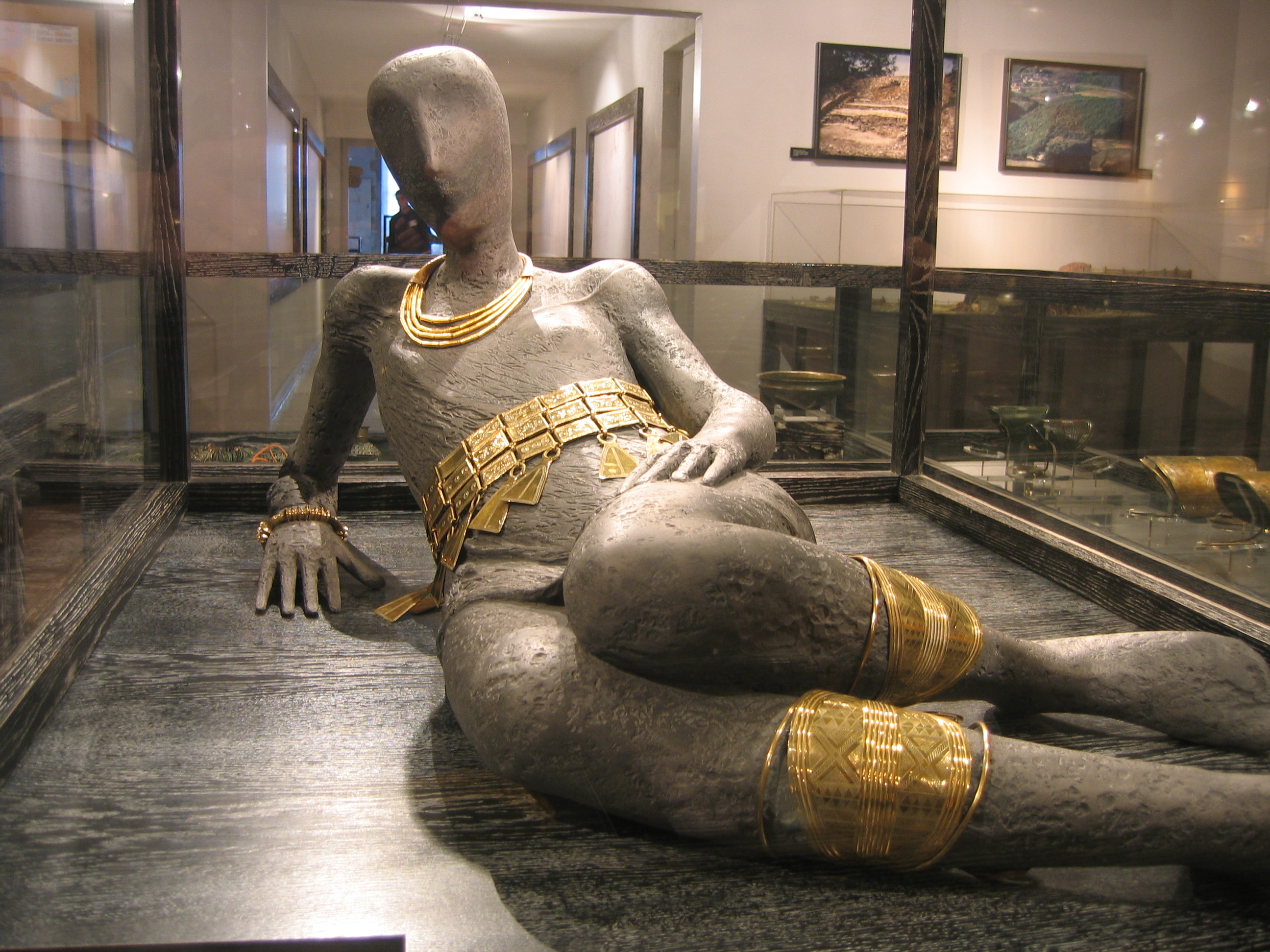 Trésor de Blanot musée archéologique Dijon France